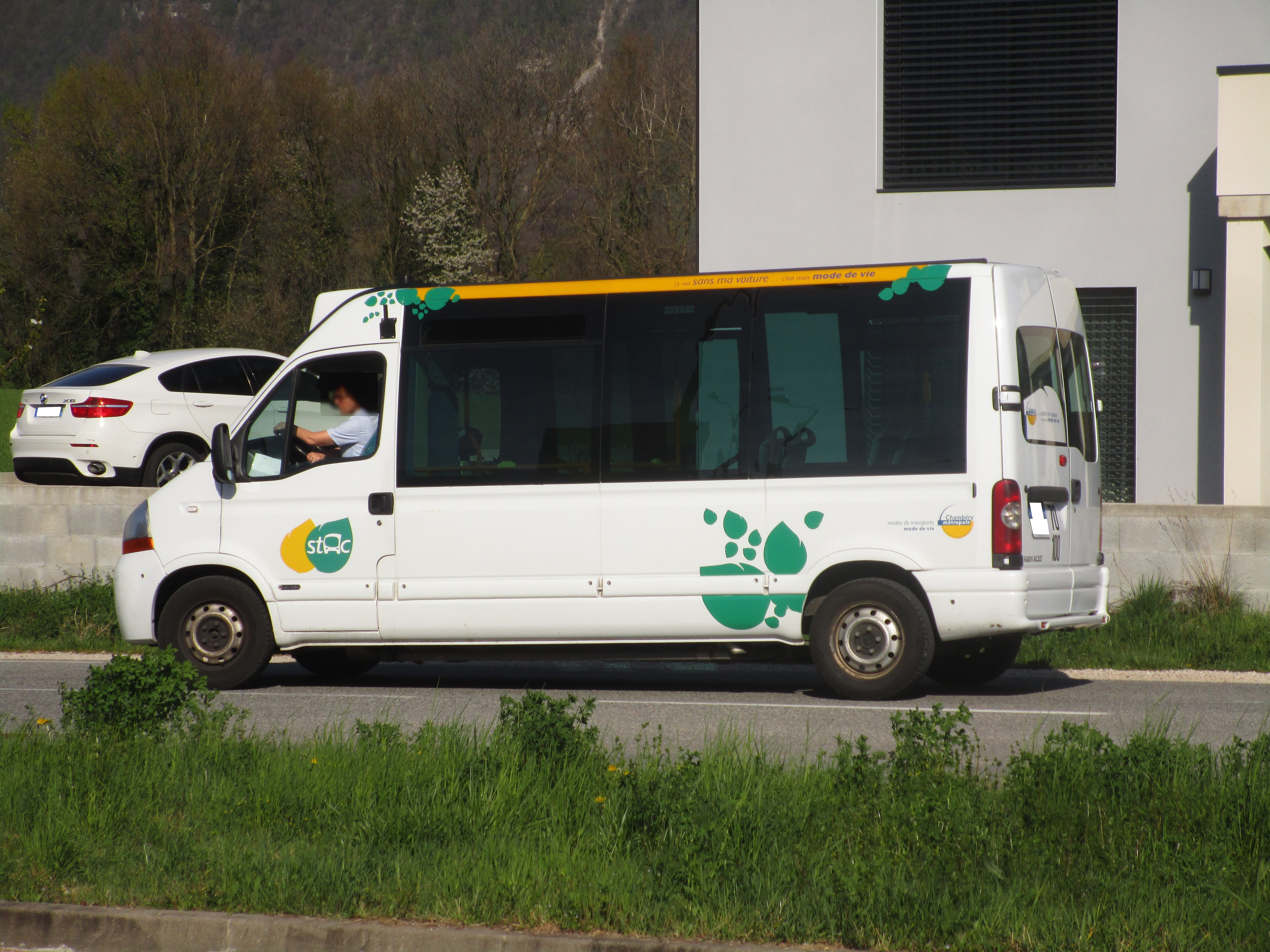 The Renault Dietrich Noventis 420 n°6065 of the Stac, on the line 10 (shuttle around the Parc Relais Maison Brulée, Sonnaz), at the Parc Relais Maison Brulée (in Sonnaz) on March 30, 2017.